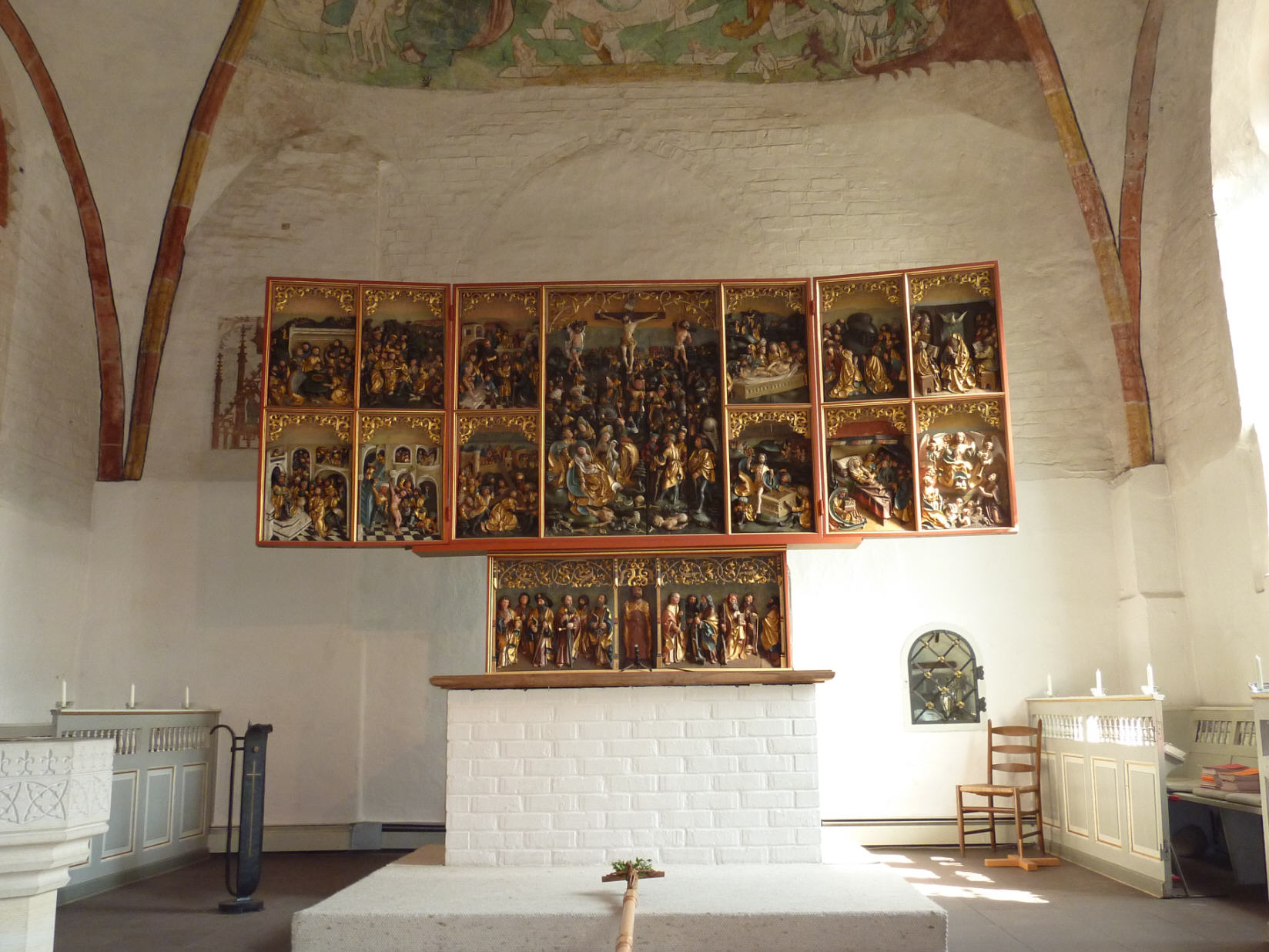 Altar in St. Johannes, Bad Zwischenahn